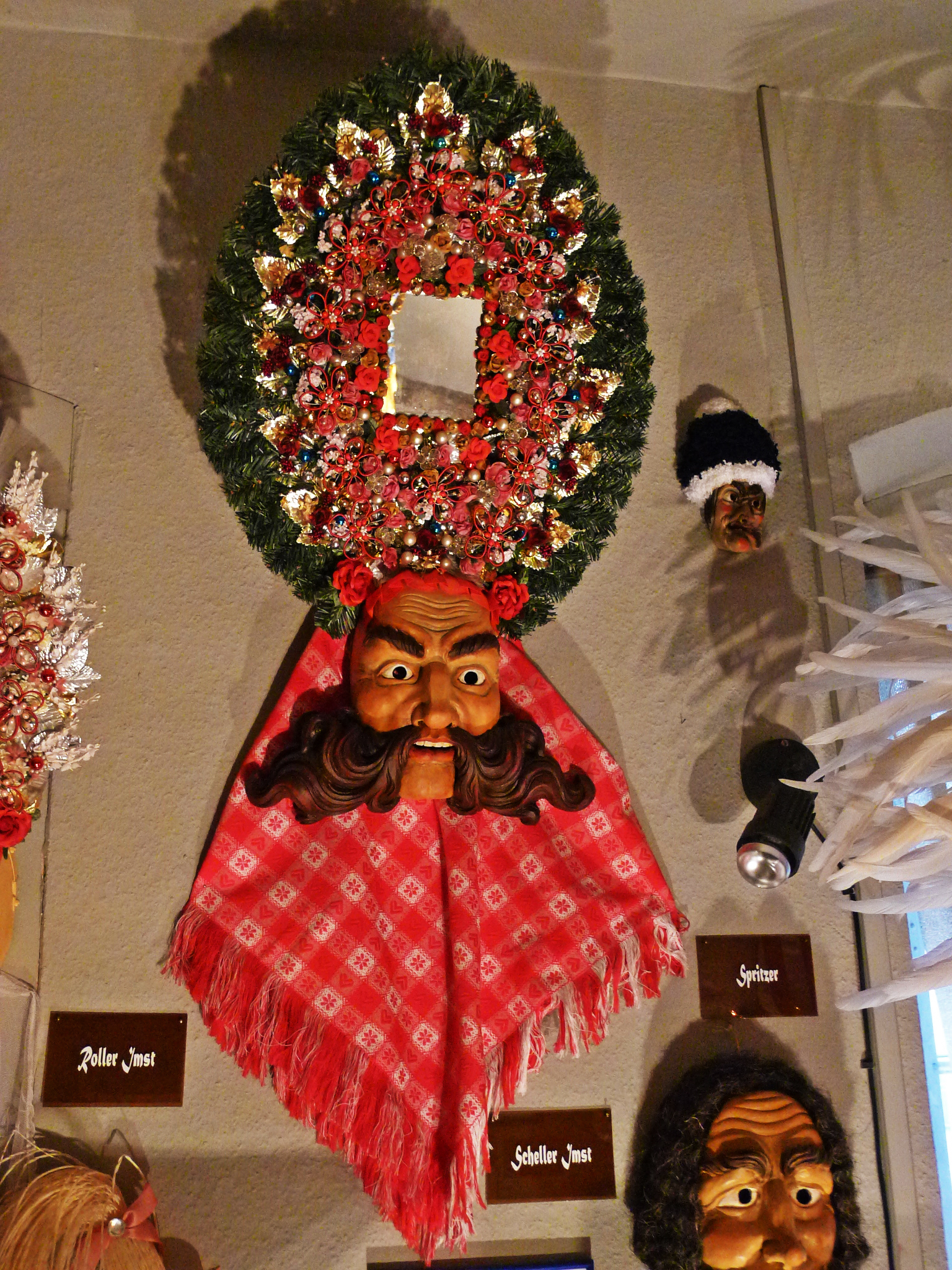 Scheller vom Imster Schemenlaufen, hier in der Oberrheinischen Narrenschau Kenzingen ausgestellt